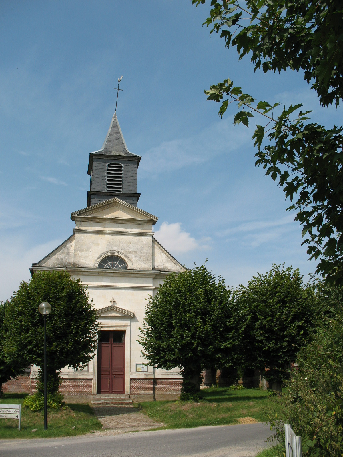 L'église de Bavelincourt a été construite entre 1848 et 1854. Sa façade est du style néo-classique, ornée de deux frontons triangulaires. L'édifice est en briques sur un soubassement de grès, hormis la façade, ainsi que la corniche, le bandeau et les pilastres décorant les murs latéraux, qui sont en craie.